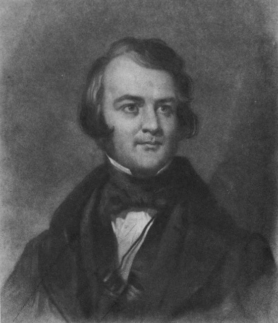 Willis Gaylord Clark, gravure de John Sartain, publiée en 1840 dans le Philadelphia Monthly Magazine.